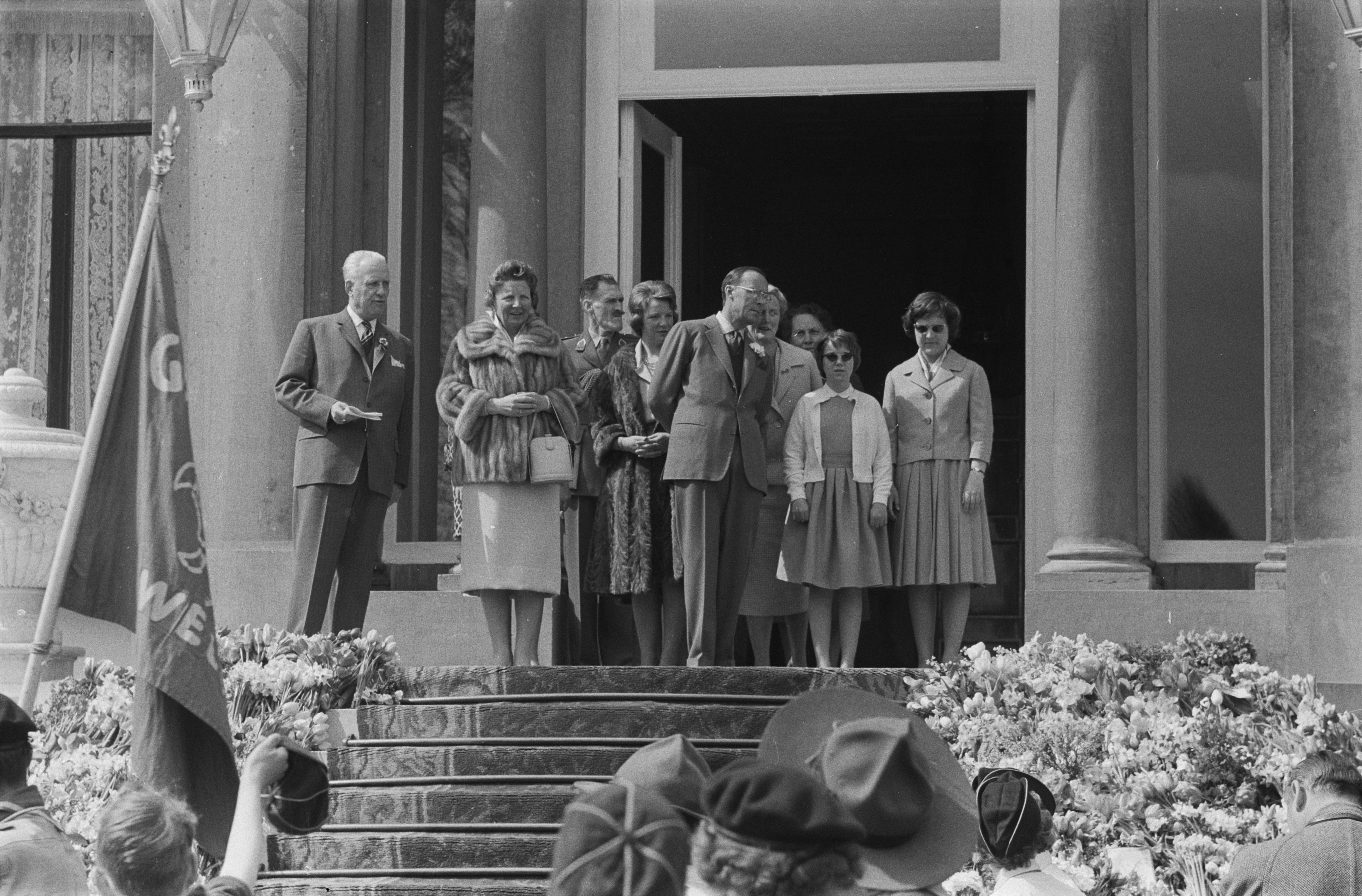 Collectie / Archief : Fotocollectie Anefo Reportage / Serie : Koninginnedag 1960 Beschrijving : De koninklijke familie op het bordes van paleis Soestdijk Datum : 30 april 1960 Locatie : Soestdijk, Utrecht Trefwoorden : Bloemendefilés, Koninklijke familie, bordes, koningin Instellingsnaam : Paleis Soestdijk Fotograaf : Fotograaf Onbekend / Anefo Auteursrechthebbende : Nationaal Archief Materiaalsoort : Negatief (zwart/wit) Nummer archiefinventaris : bekijk toegang 2.24.01.05 Bestanddeelnummer : 911-2043